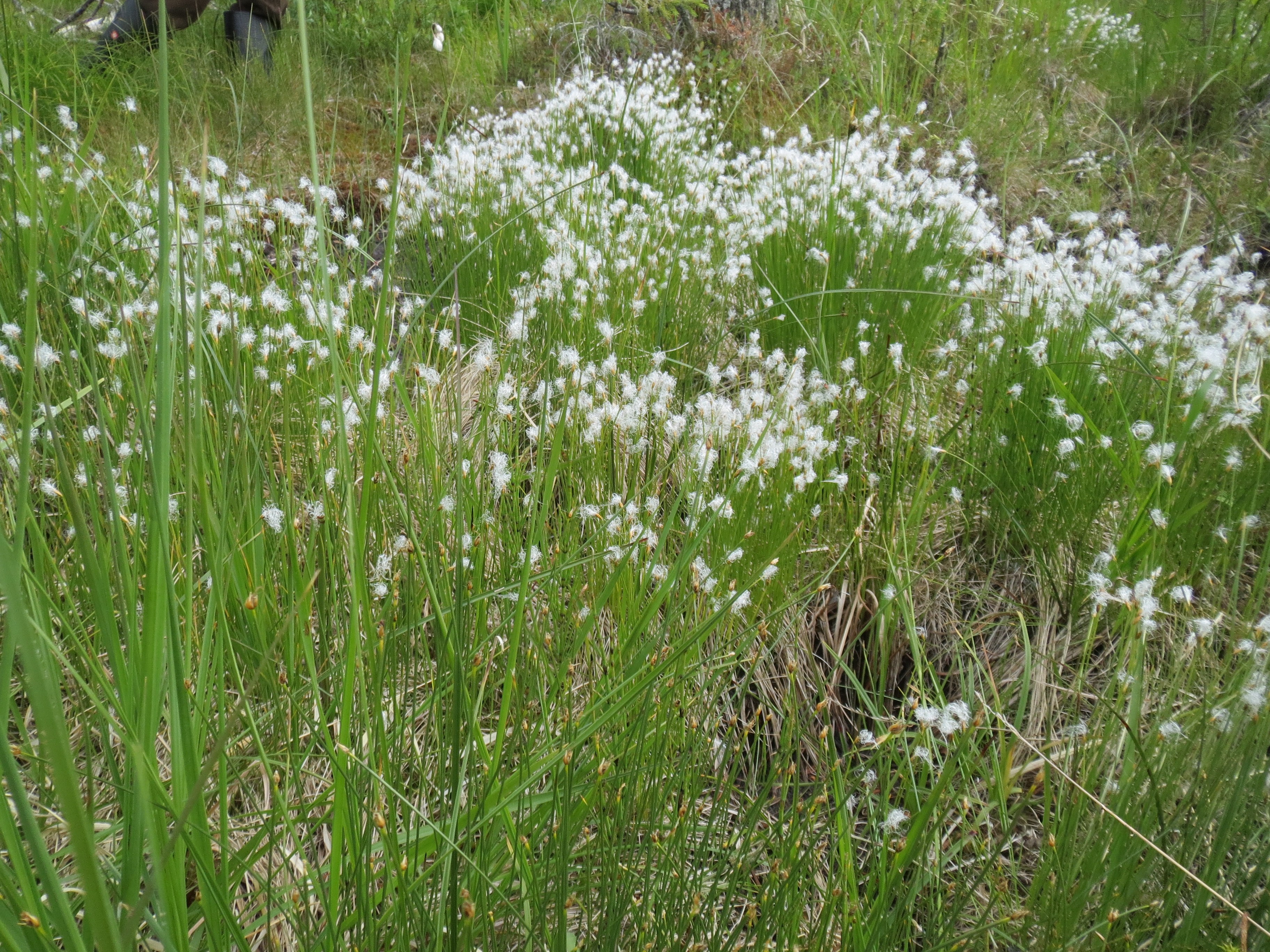 Villapääluikkaa kajaanilaisella suolla